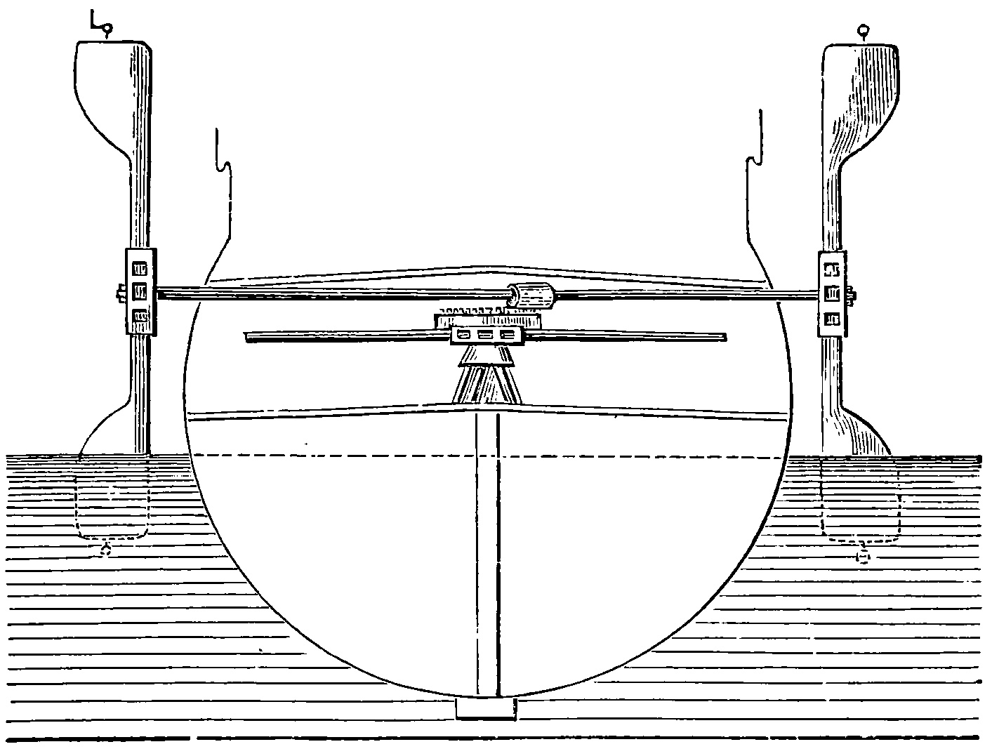 トマス・セイヴァリによるパドル・ホィール・ボート